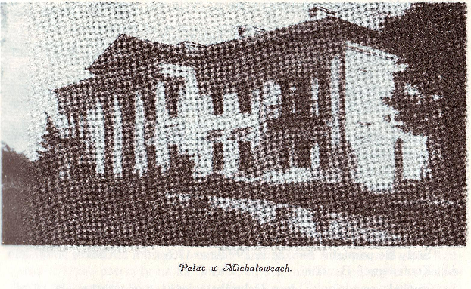 Michałowce - dwór Sobańskich